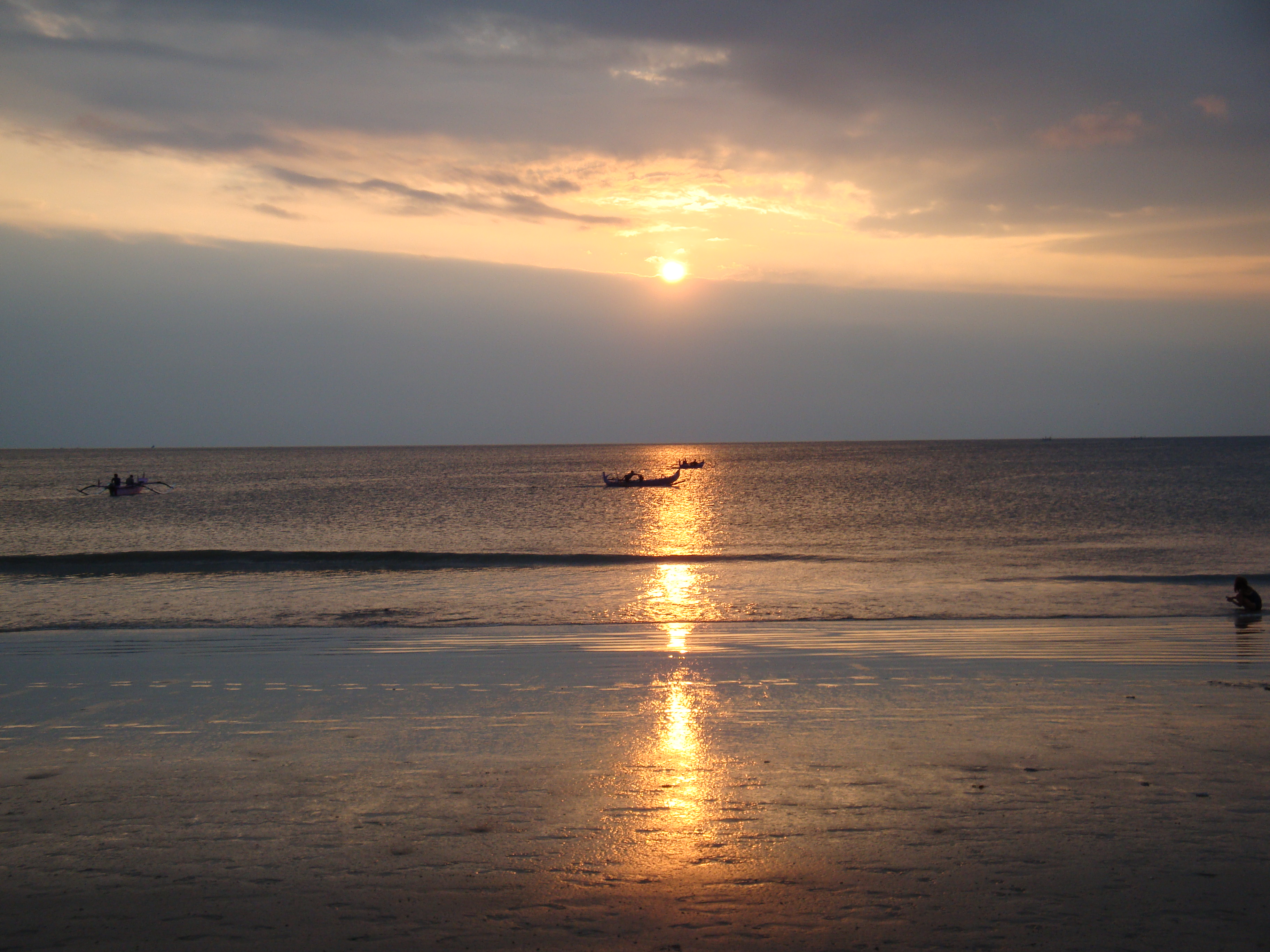 Рыбаки уходят в море на фоне заката на Бали, 2009)